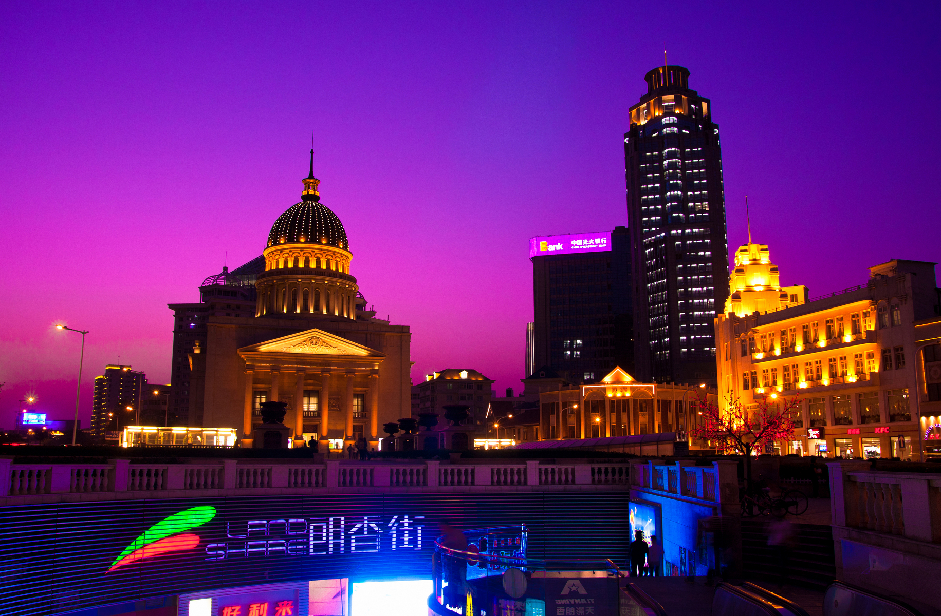 天津音乐厅